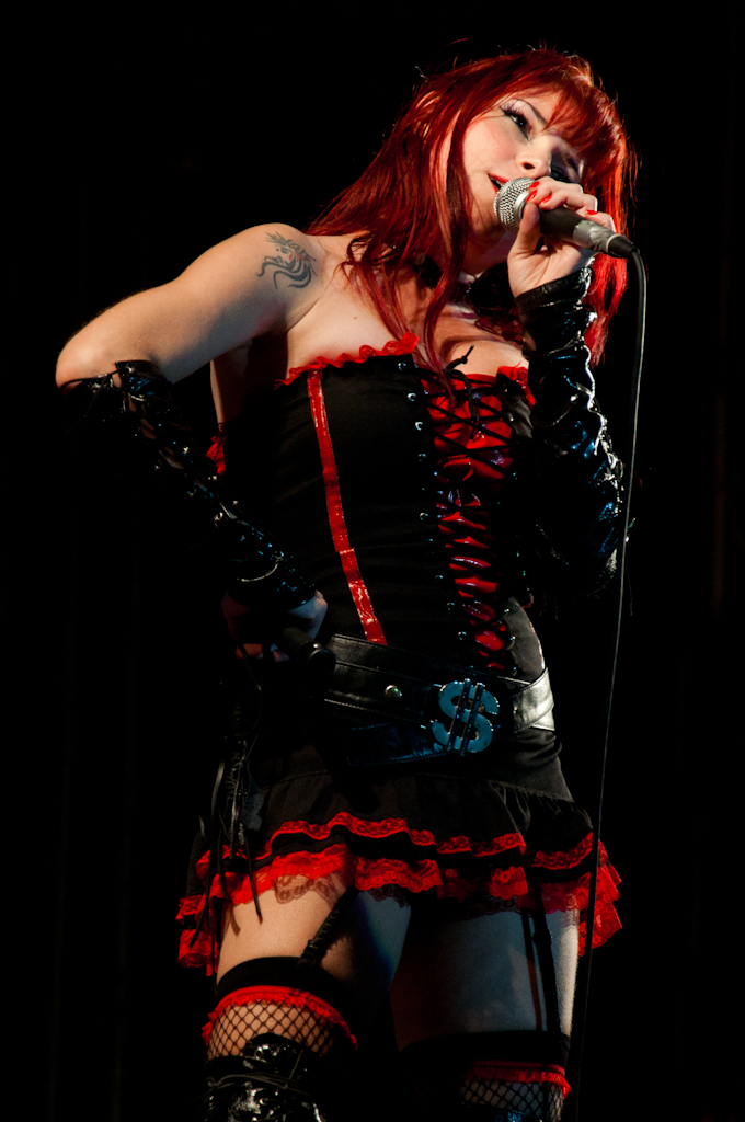 Juliana Kosso, das Velhas Virgens, banda brasileira independente de rock que tem como característica letras irreverentes, geralmente com assuntos sexuais e alcoólicos. Suas apresentações costumam ressaltar sua opinião política